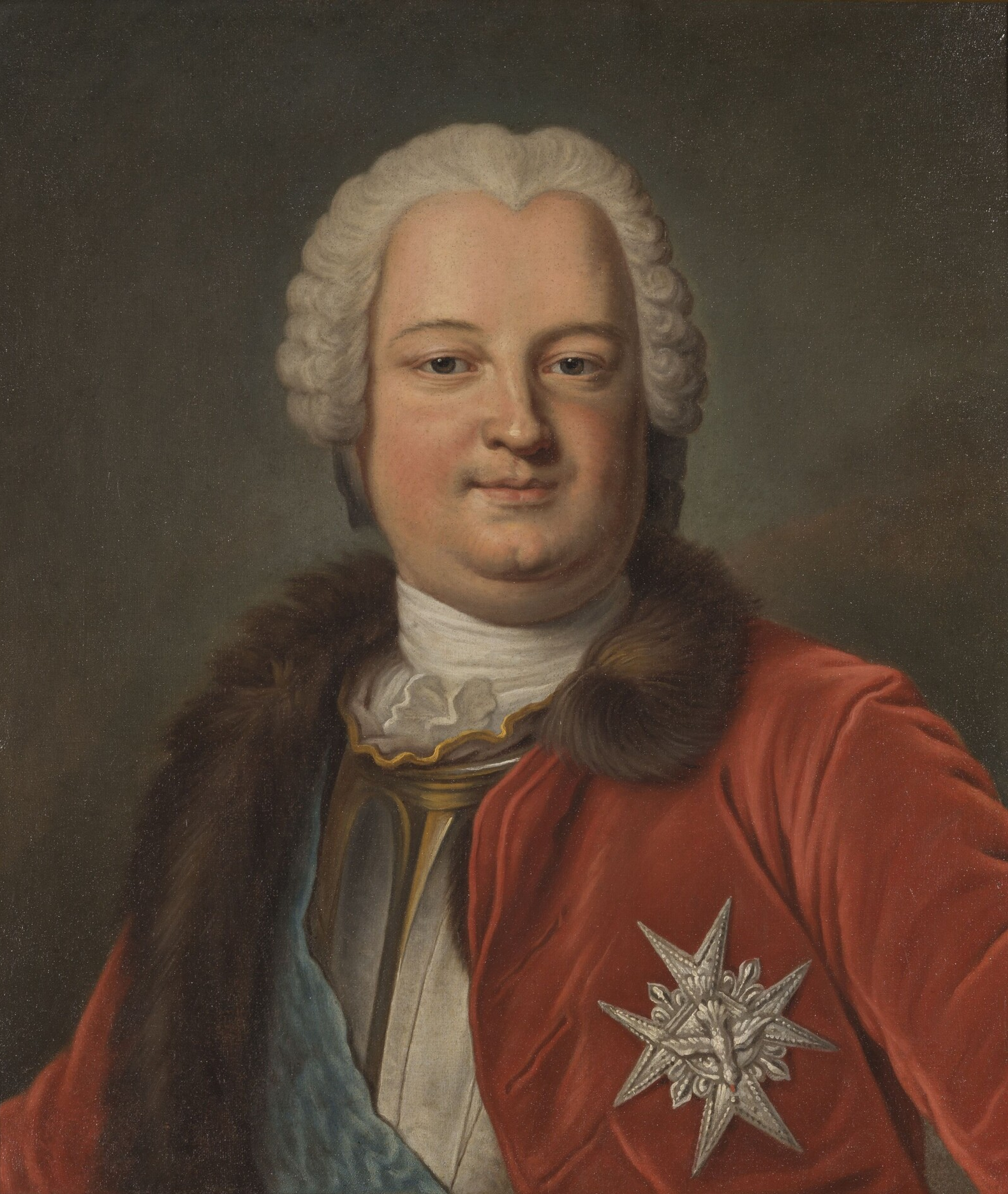 Portrait de Louis Bourbon de Condé.